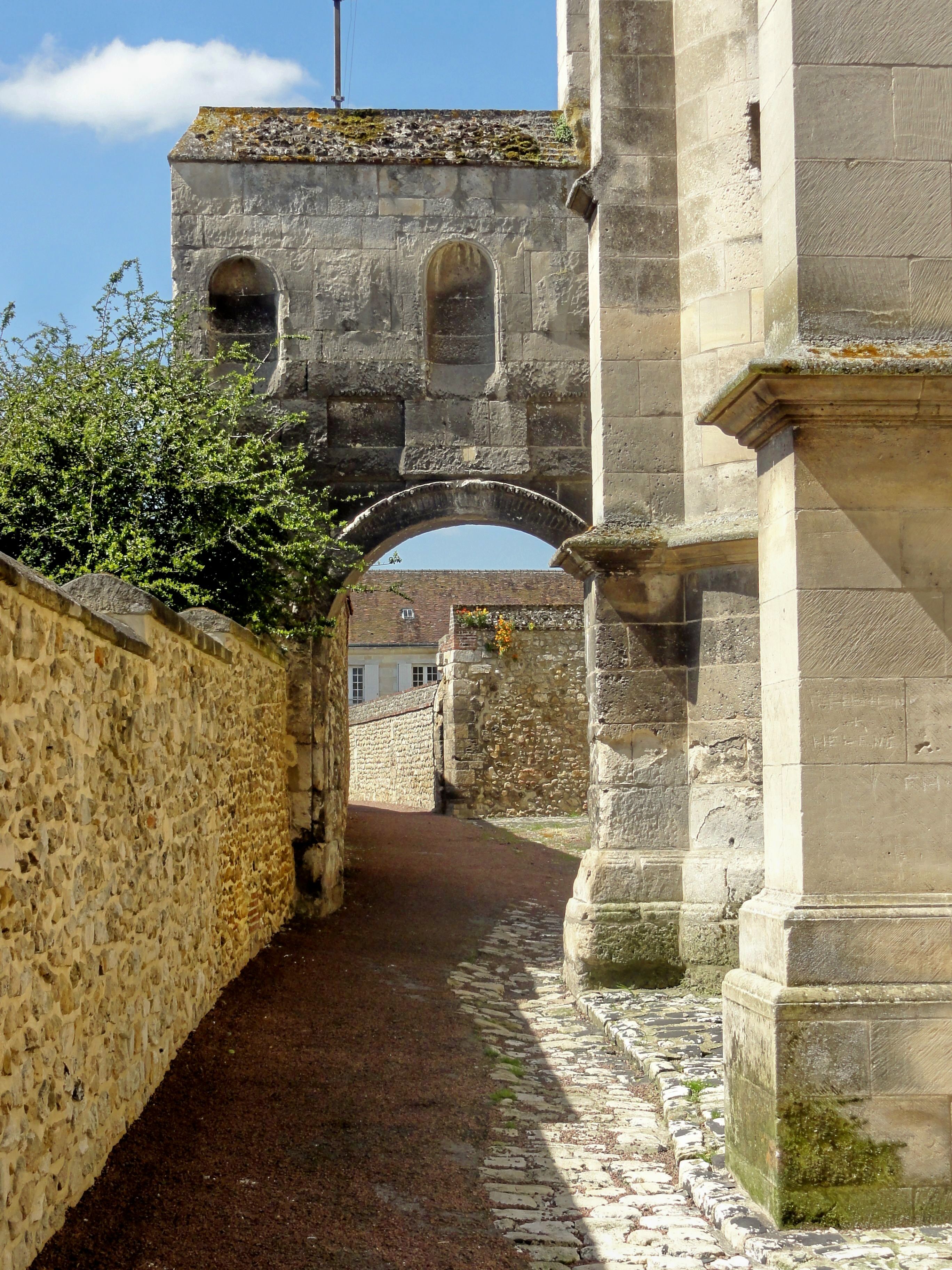 Arcade sur le passage côté sud.